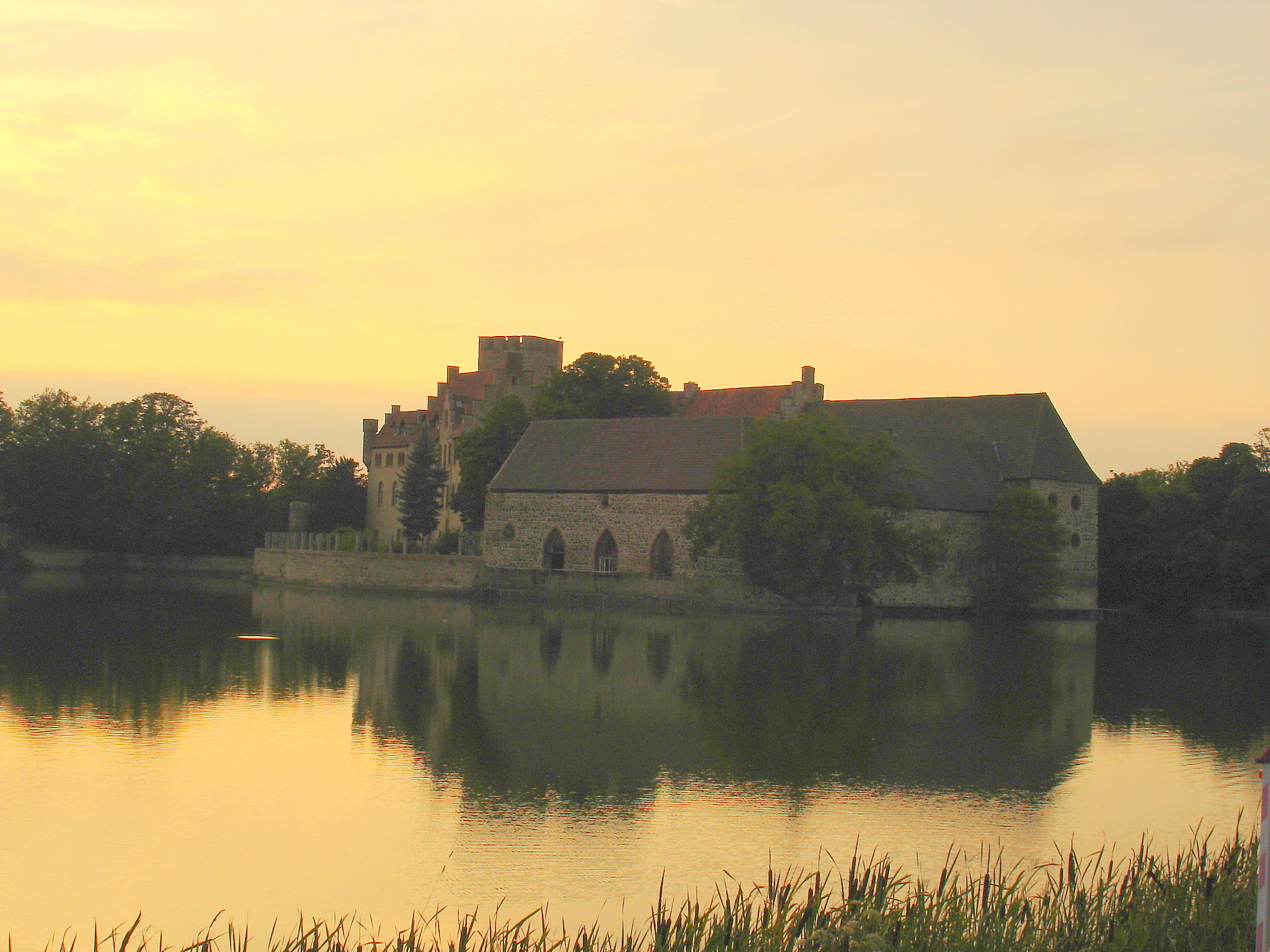 De waterburcht van Flechtingen in de Duitse deelstaat Saksen-Ahalt.